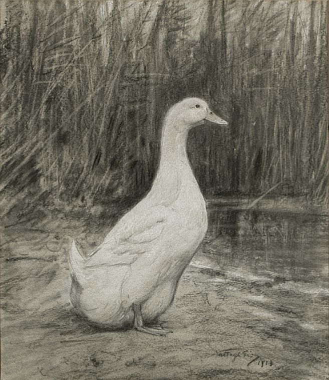 Pekingi tojó jellemző hibákkal. Vastagh Géza rajza.